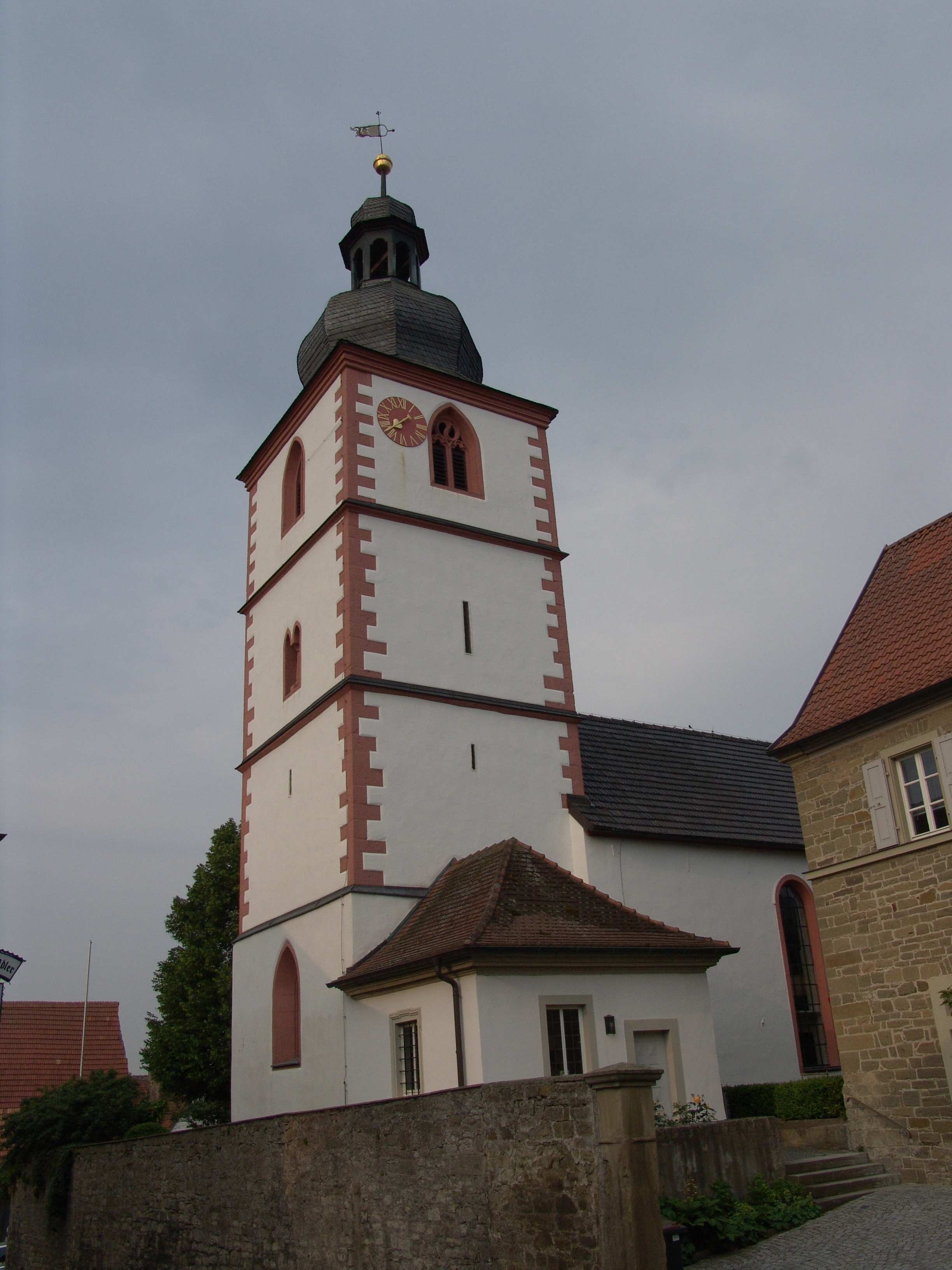 evang.-luth. Kirche St. Laurentius in Repperndorf